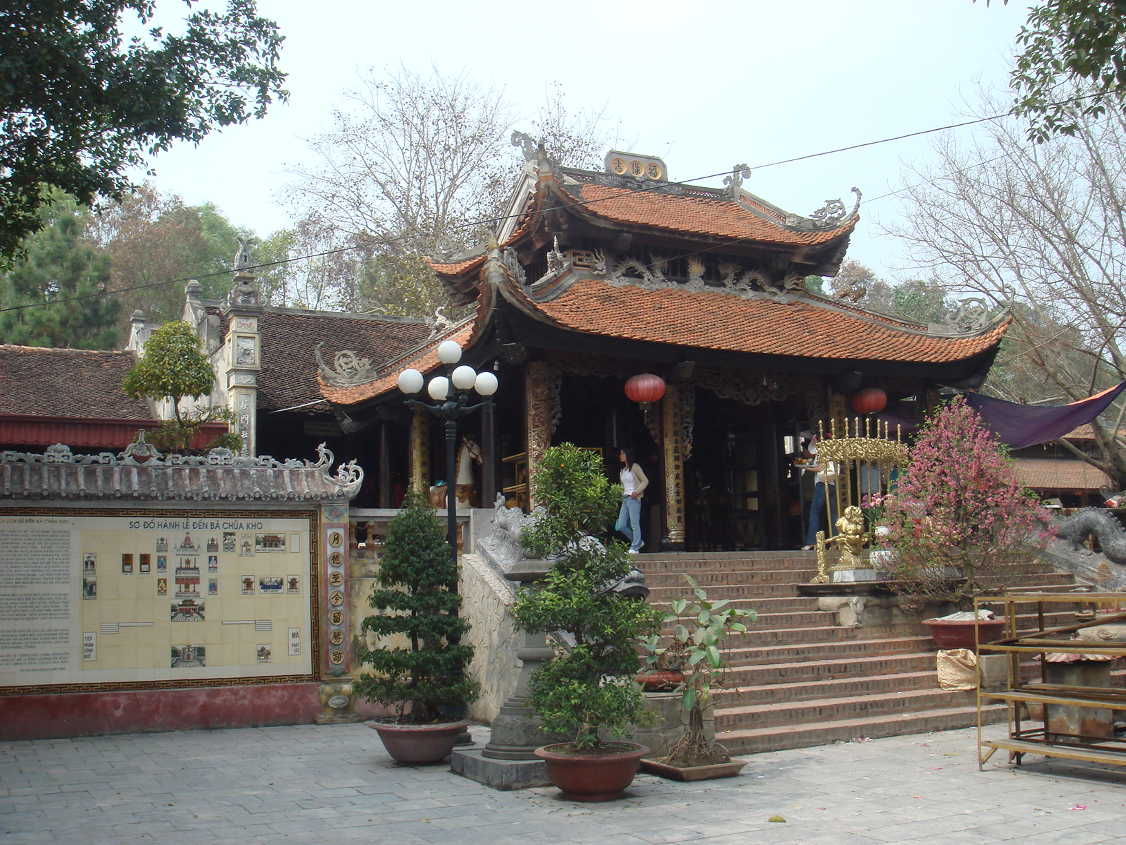 Đền Bà Chúa Kho